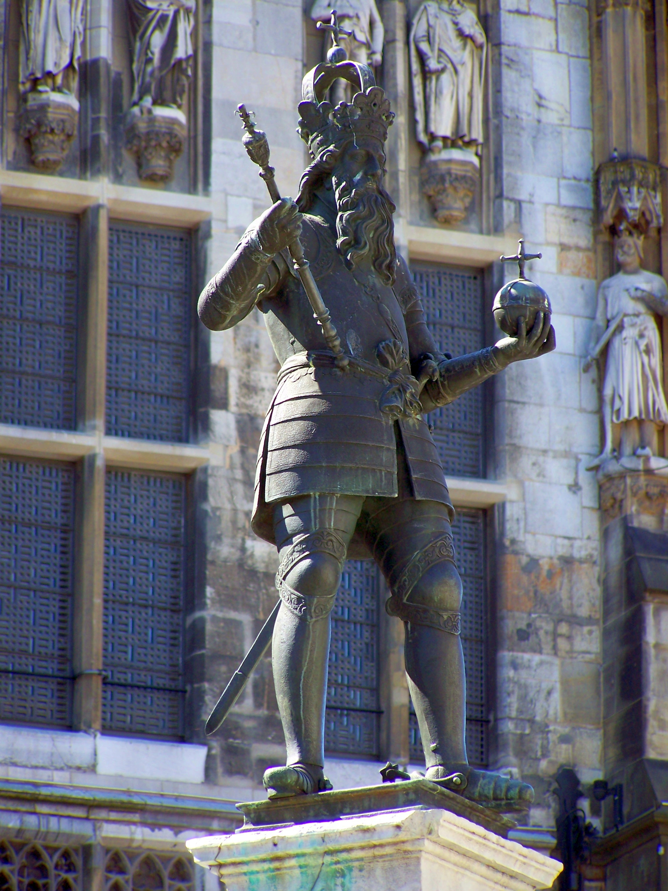 Aachen Kaiser Karl